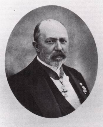 Fotografía del duque Roberto de Parma, Infante de España con la venera del Toisón de Oro concedida por Carlos VII.